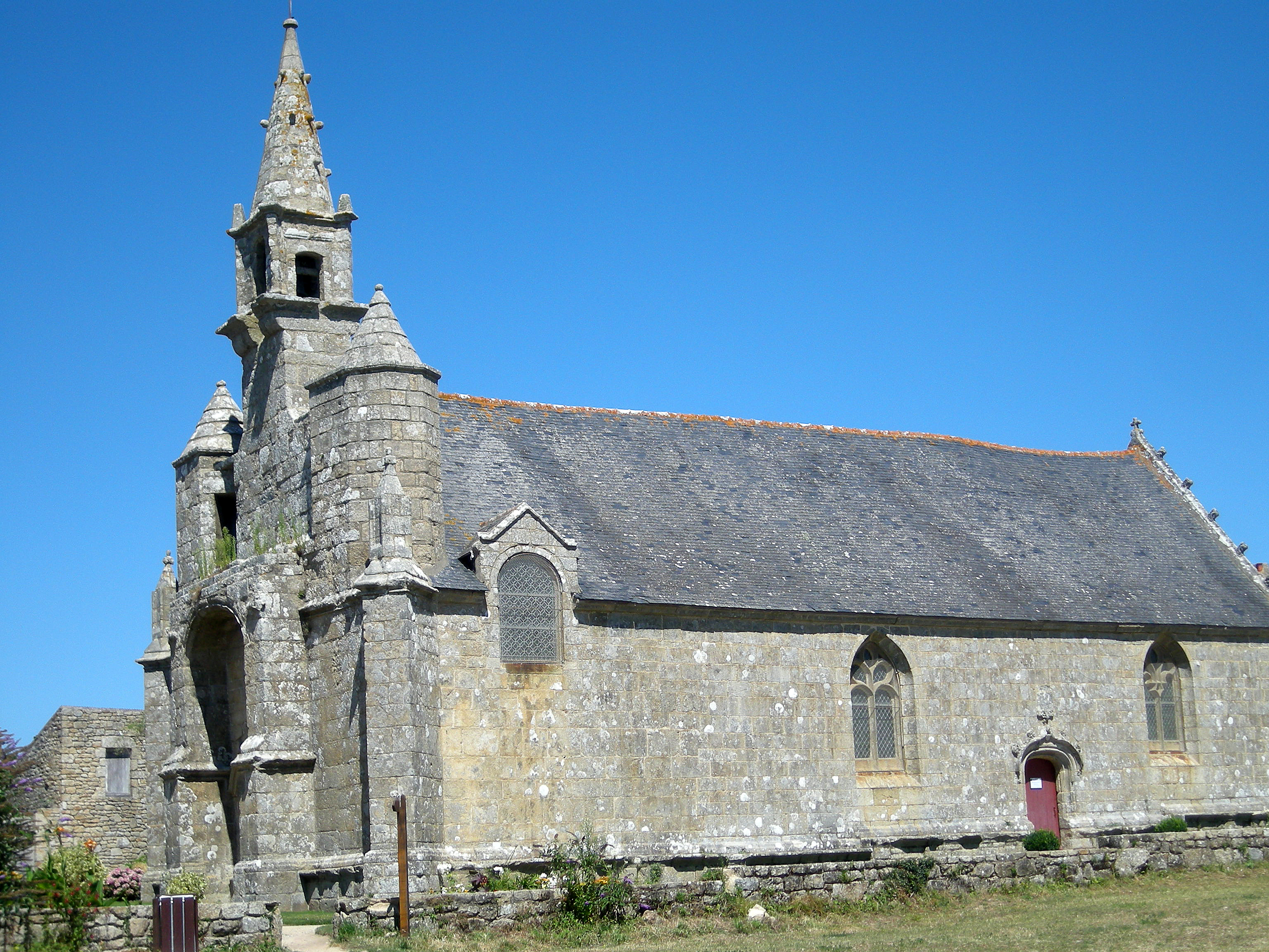 Vue générale du Sud-Ouest